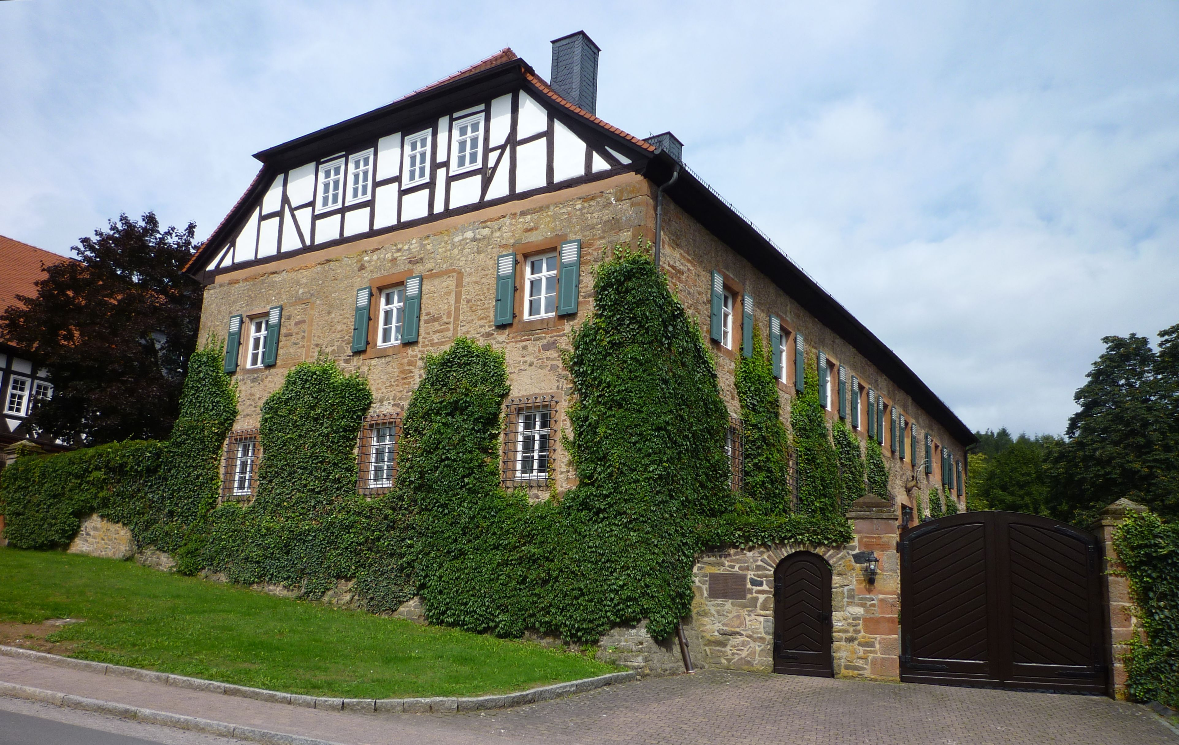 Frankenberg - Hessischer Gutshof Viermünden 1633, renoviert 1983